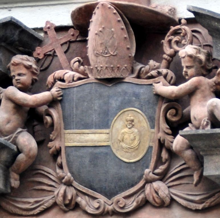 Znak Metropolitní kapituly u sv. Víta v Praze z portálu Starého proboštství.